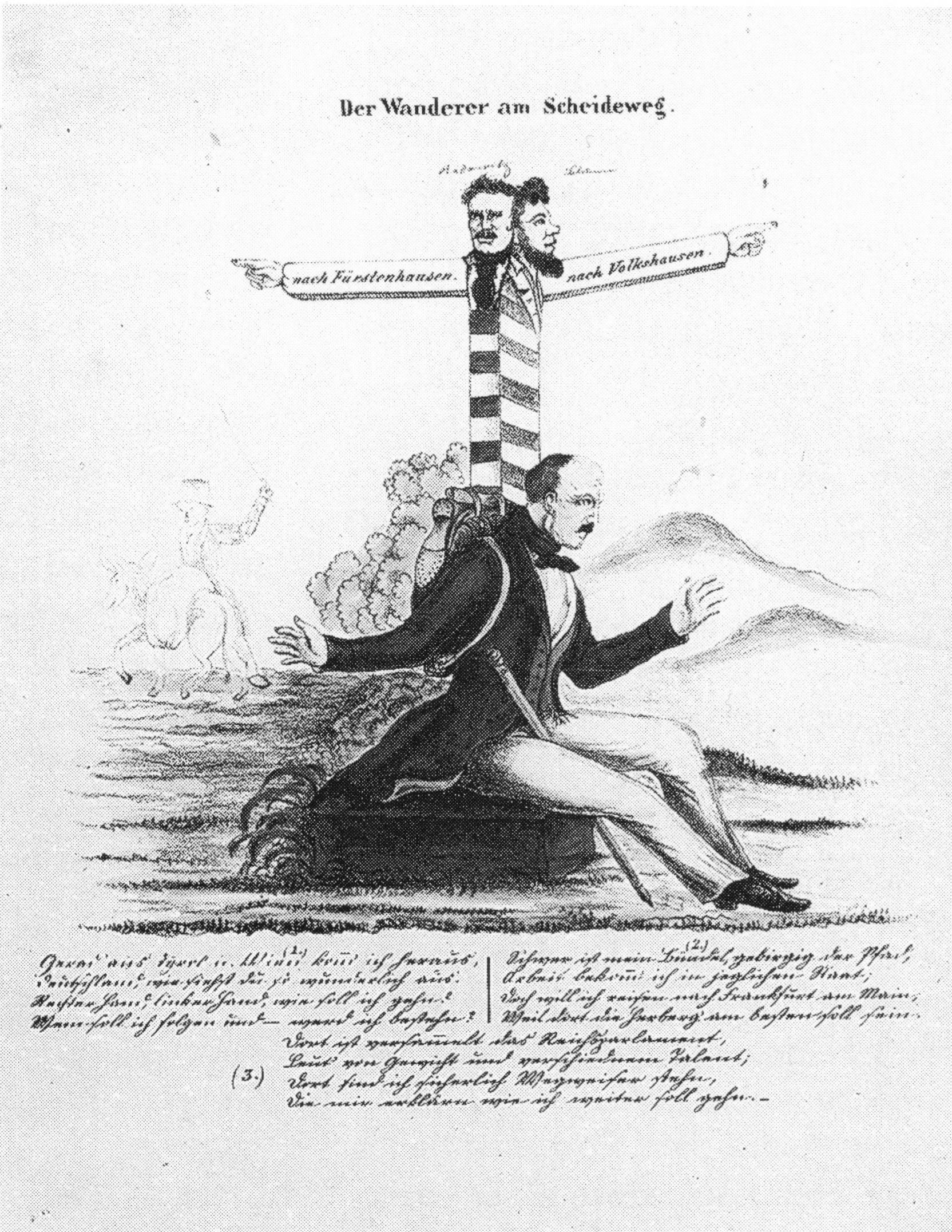 Lithographie, 1848. “Der Wanderer am Scheideweg.” Reichsverweser Johann.